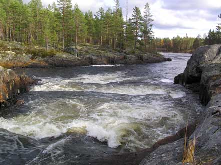 Från mina egna bilder. Fotograf: Tommy Halvarsson